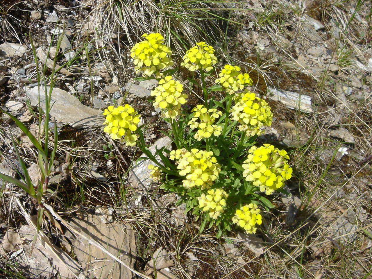 Erysimum seipkae (syn. E. pumilum)